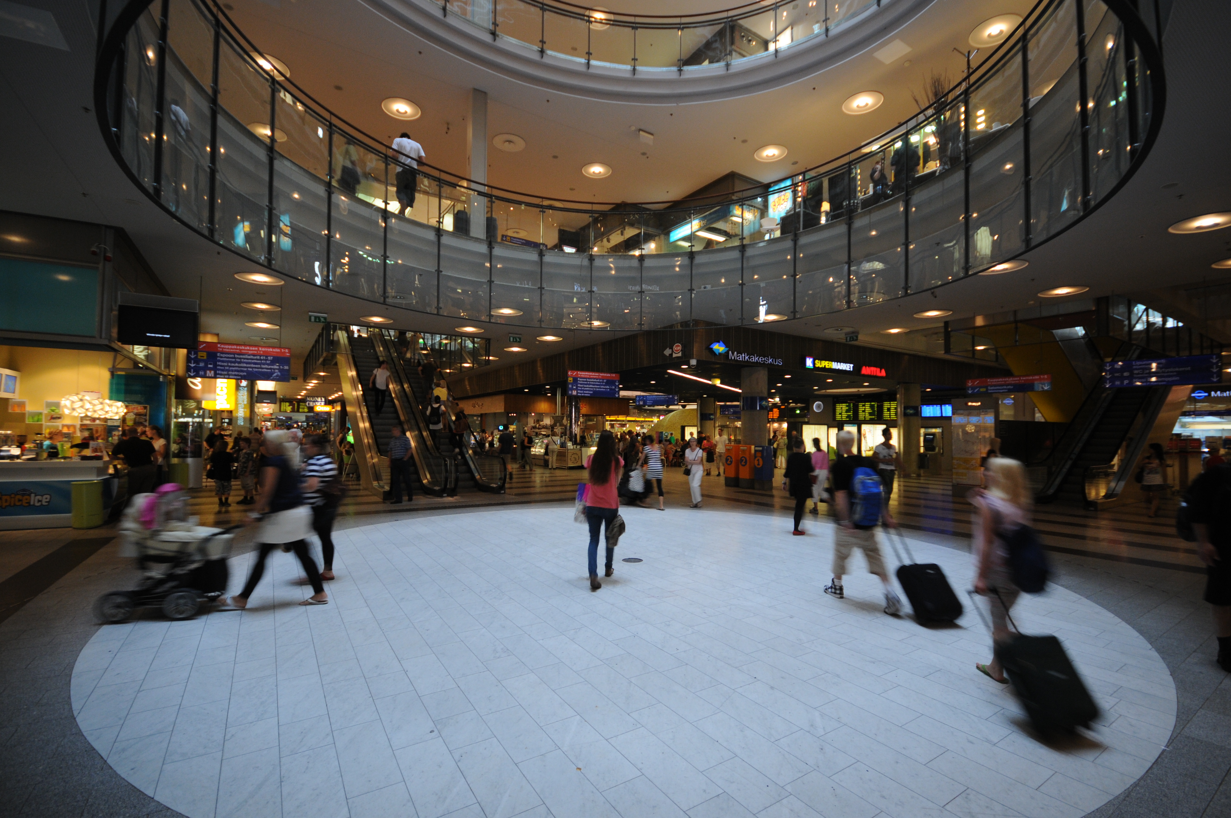 Helsinki